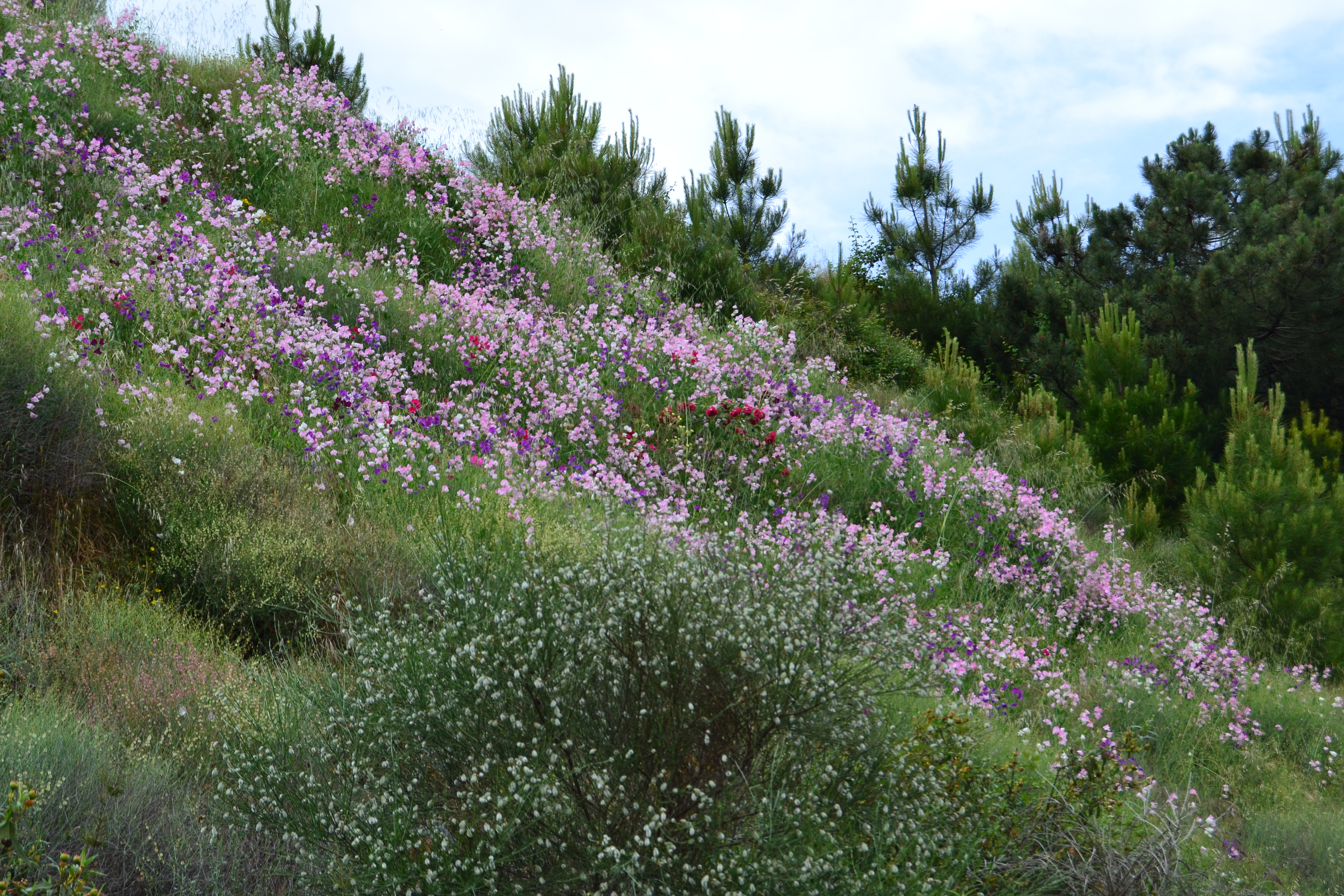 En primavera, los alrededores de Cambroncino, se cuajan de flores multicolores. En la imagen, una ladera en el camino que a del Barrio de Abajo a la Era.